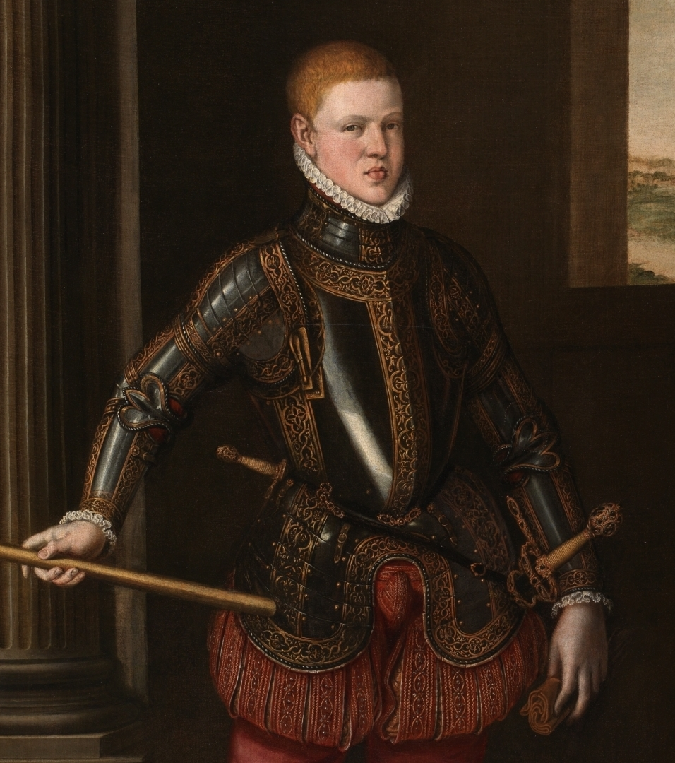 Retrato juvenil del rey Sebastián I de Portugal (1554-1578), que murió en la batalla de Alcazarquivir.